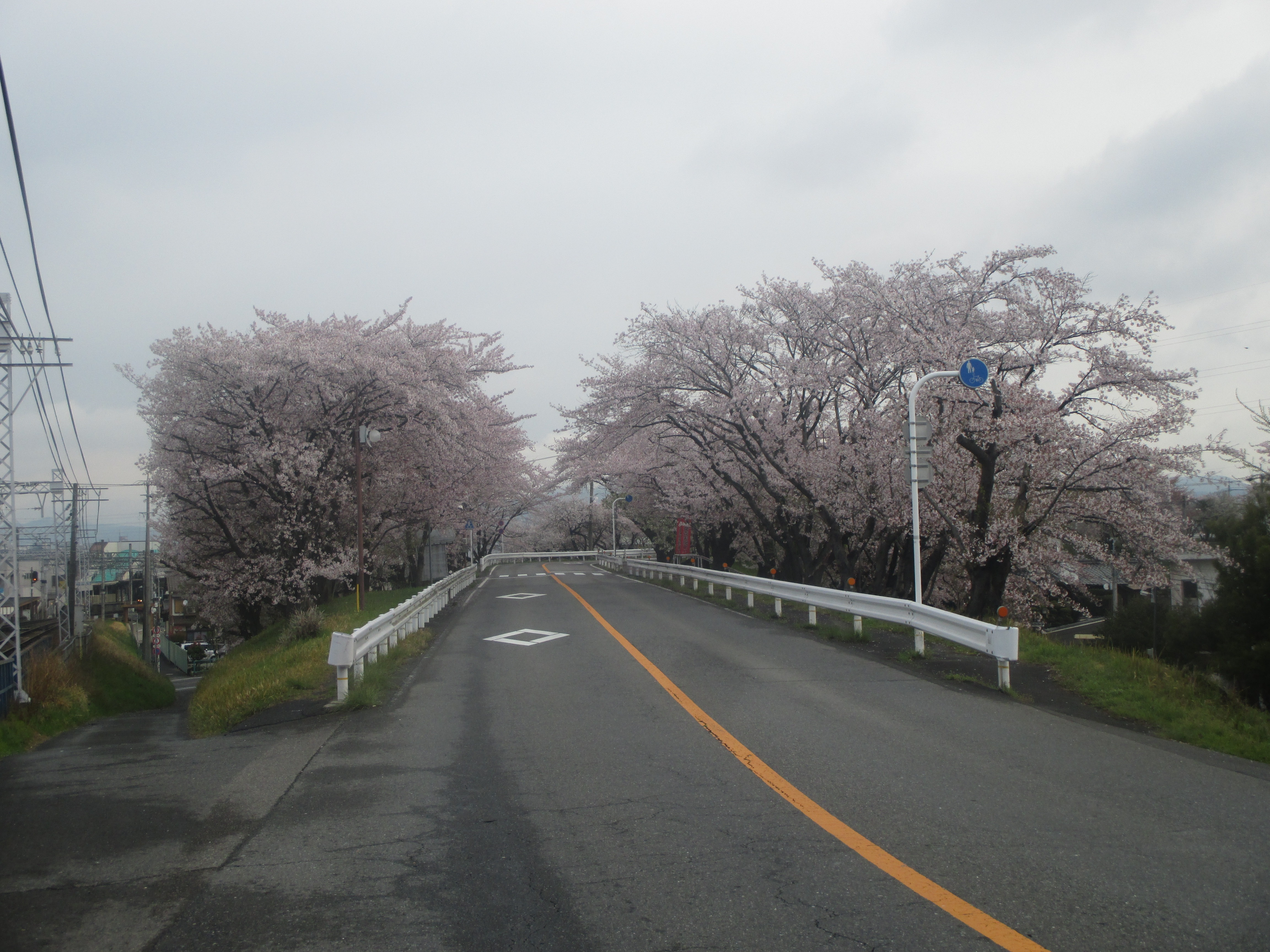 笠松町奈良津の木曽川堤防に咲く桜